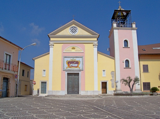 La Chiesa del Santissimo Salvatore a Pesco Sannita (BN).